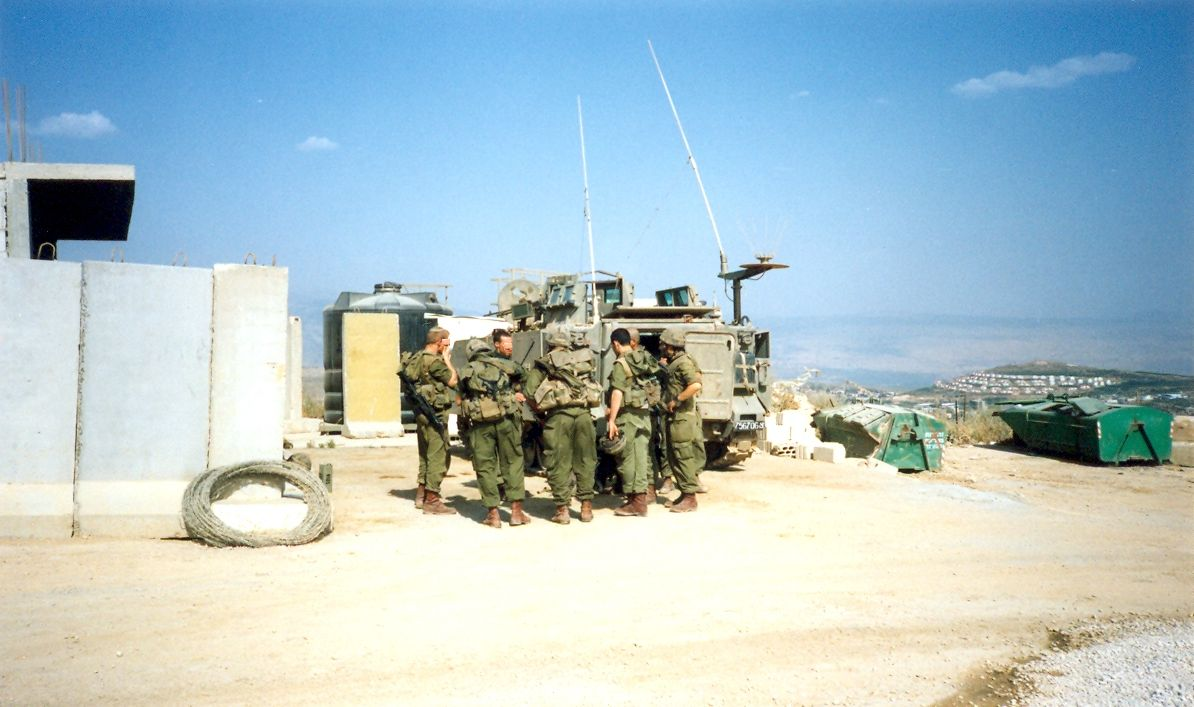 תדריך לפני פתיחת ציר ממוצב מגלגלית ברצועת הביטחון בלבנון לארץ השכונה שמצולמת . ברקע היא שכונת נרקיס במטולה התמונה צולמה על ידי טל ס.